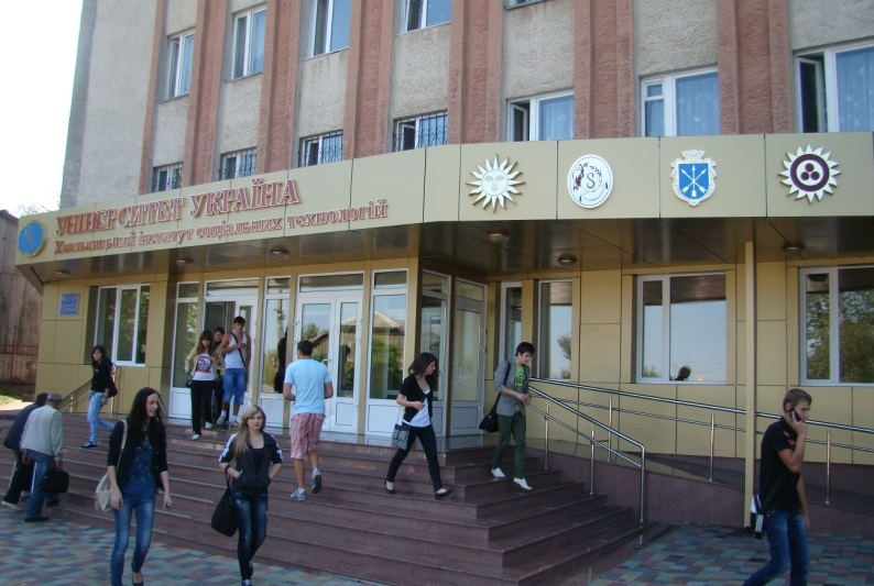 Приміщення Університету "Україна"